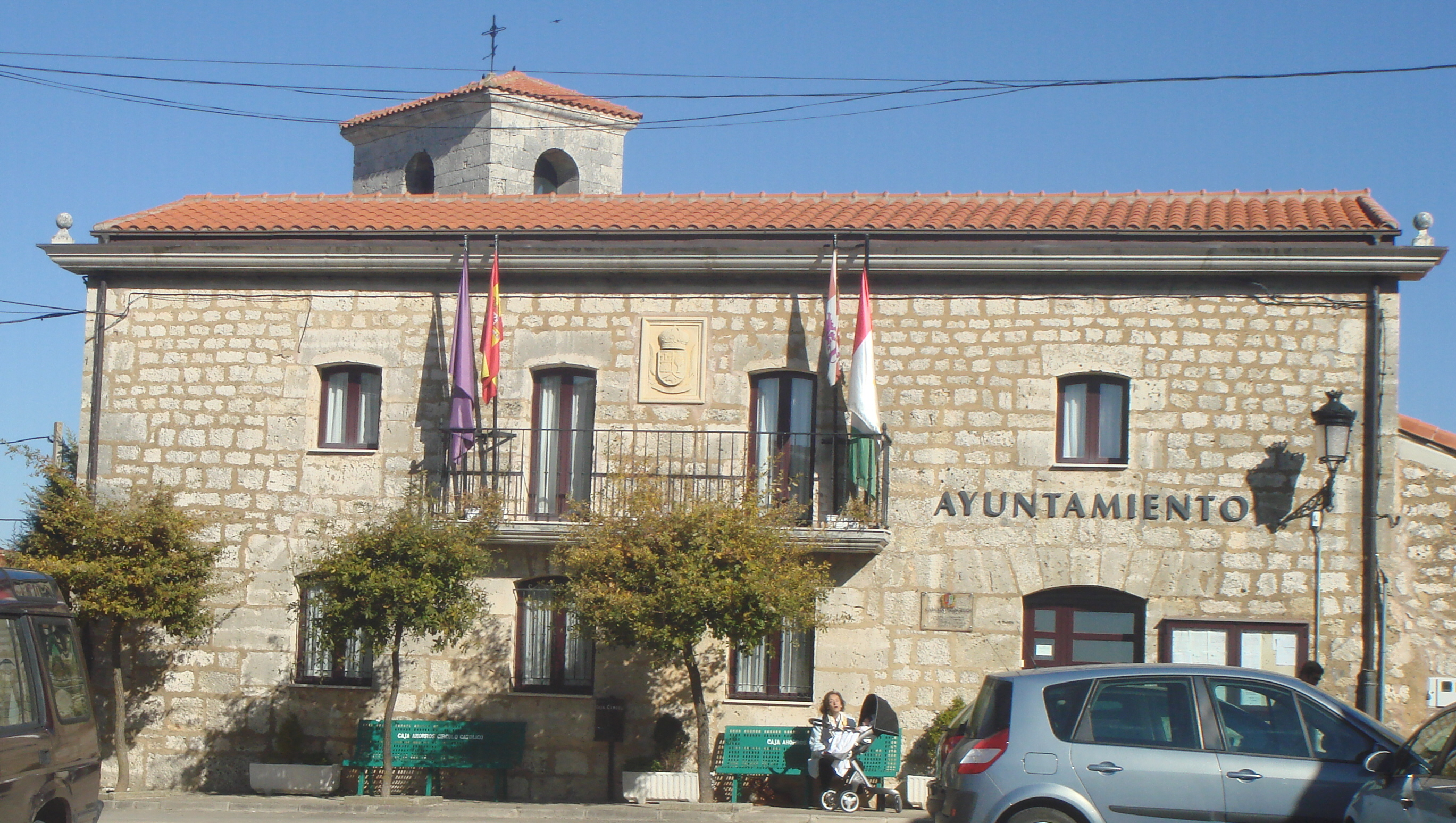 Casas Consistoriales, Carcedo de Burgos, España.